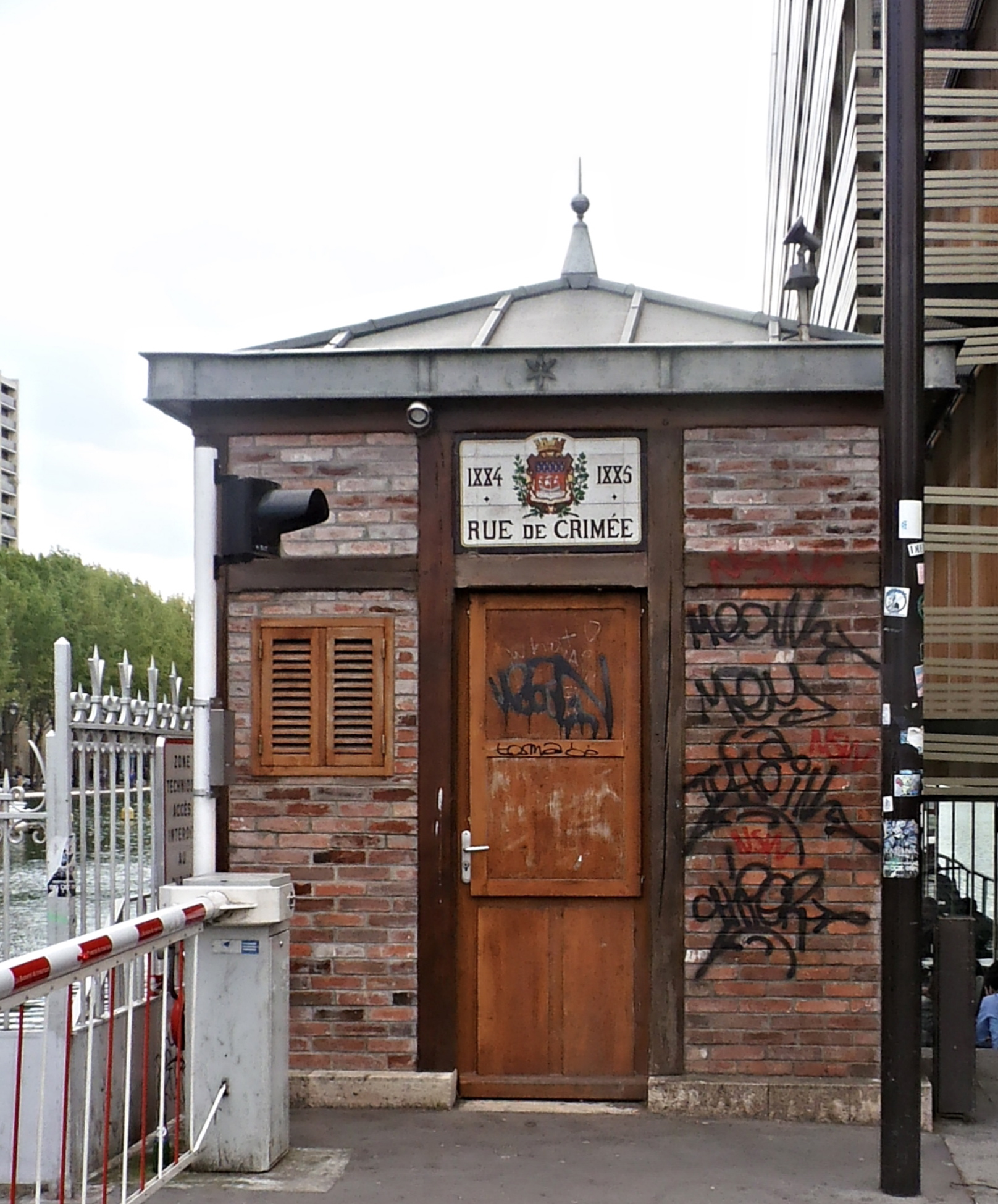 ce poste a été restauré vers 2011. Paris